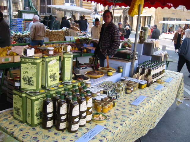 Huile d'olive sur le marché d'Avignon